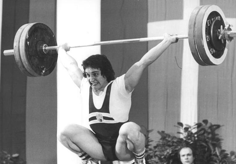 Günter Ambraß ADN-ZB Mittelstädt 11.06.1977 K.M.Stadt-Gewichtheben-Bei den DDR-Gewichthebermeisterschaften zeigte am 10.06.1977 Günter Ambraß (Leichtgewicht) die beste Leistung des Tages. Mit 170,5 kg im Stoßen verfehlte er nur knapp einen neuen DDR-Rekord. (Unser Foto von einem früheren Wettkampf)